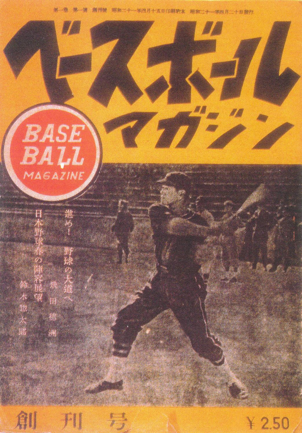 ベースボールマガジンの創刊号表紙。